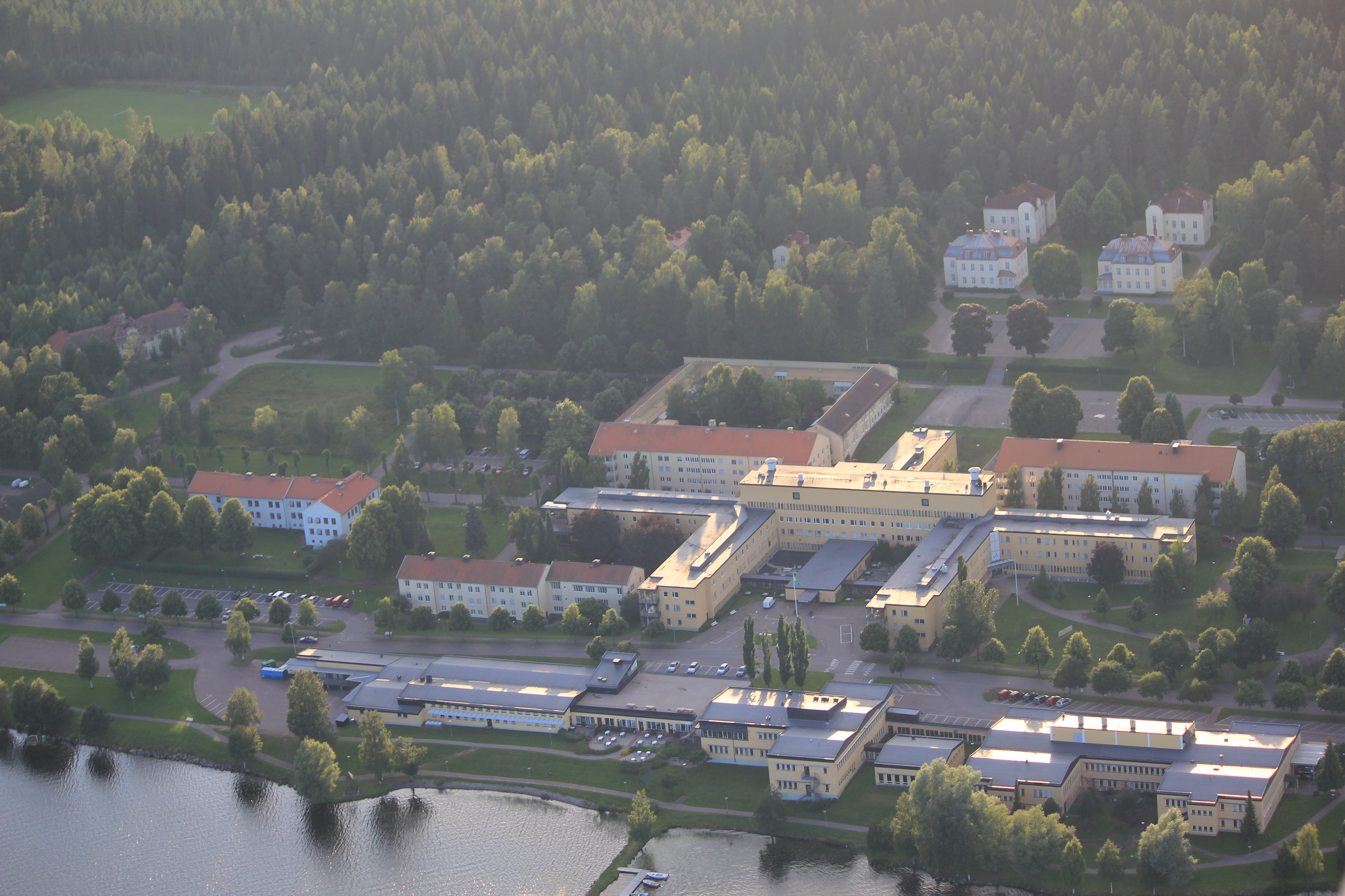 Flygfoto över Skönvik, Säters kommun, Dalarnas län, Sverige This aerial photograph has been approved for publishing by the Swedish Armed Forces with the ID: FMTM 10 830:11043 This tag does not indicate the copyright status of the attached work. A normal copyright tag is still required. See Commons:Licensing for more information.